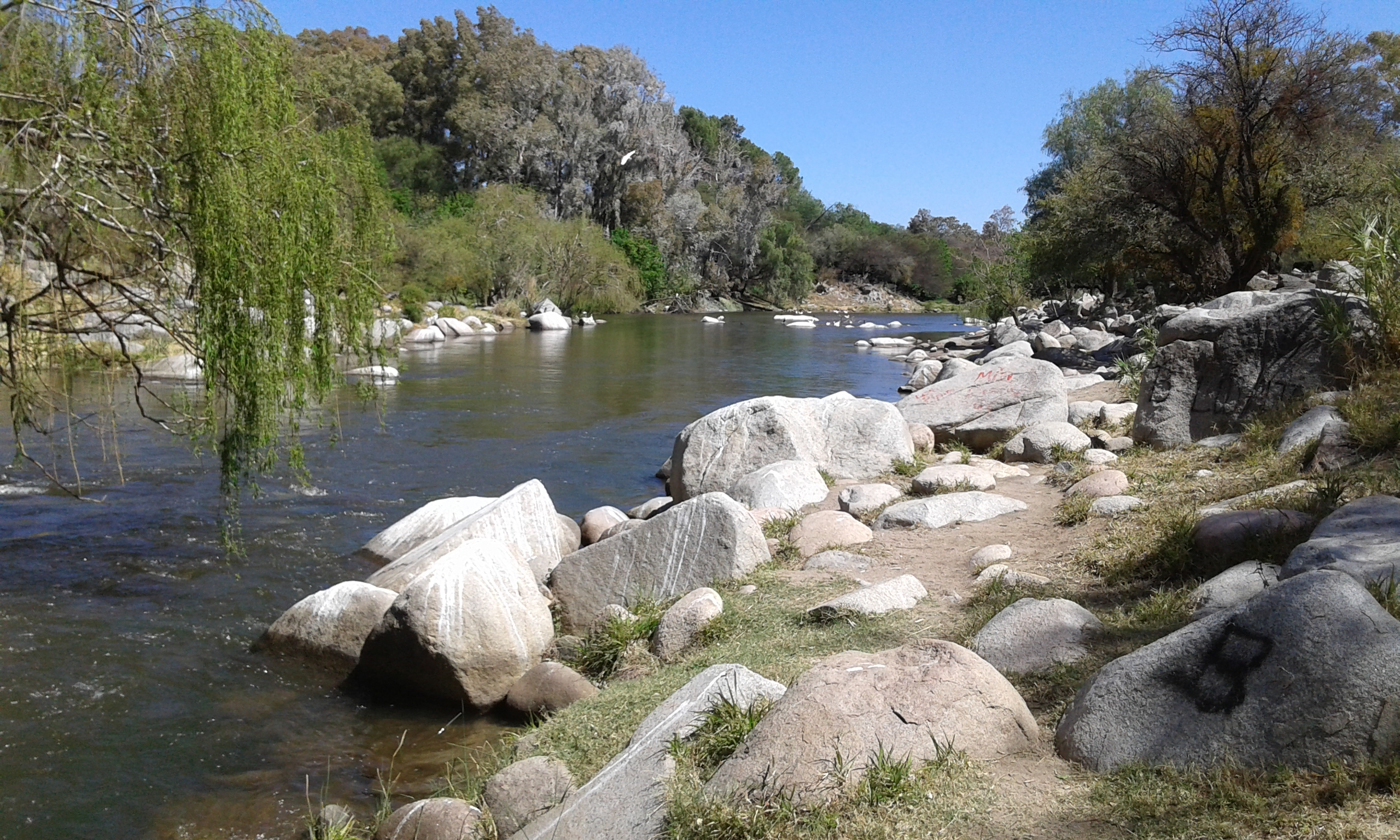 Río Cruz del Eje, al pie del Dique.